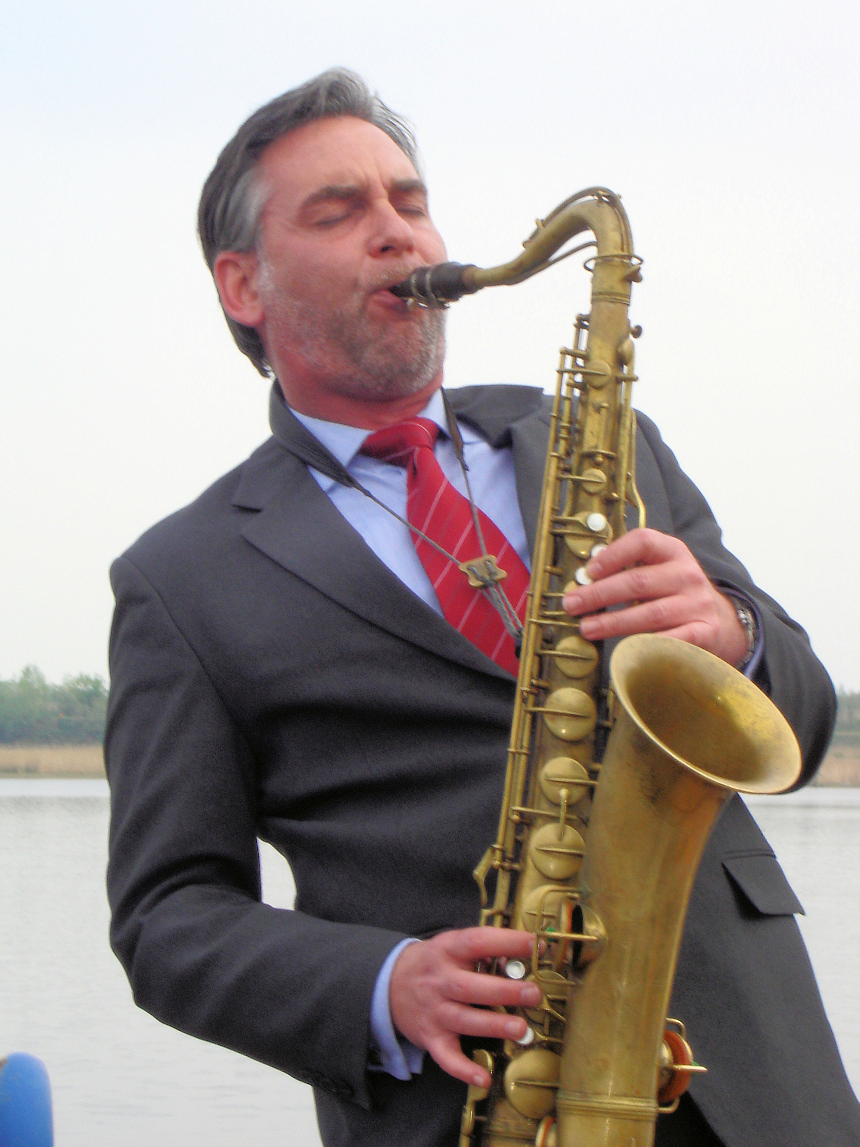 Bandleader und Saxophonist Andreas Pasternack bei der Enthüllung des Denkmals für Walter Kempowski am "Kempowski-Ufer" im Stadthafen in Rostock.